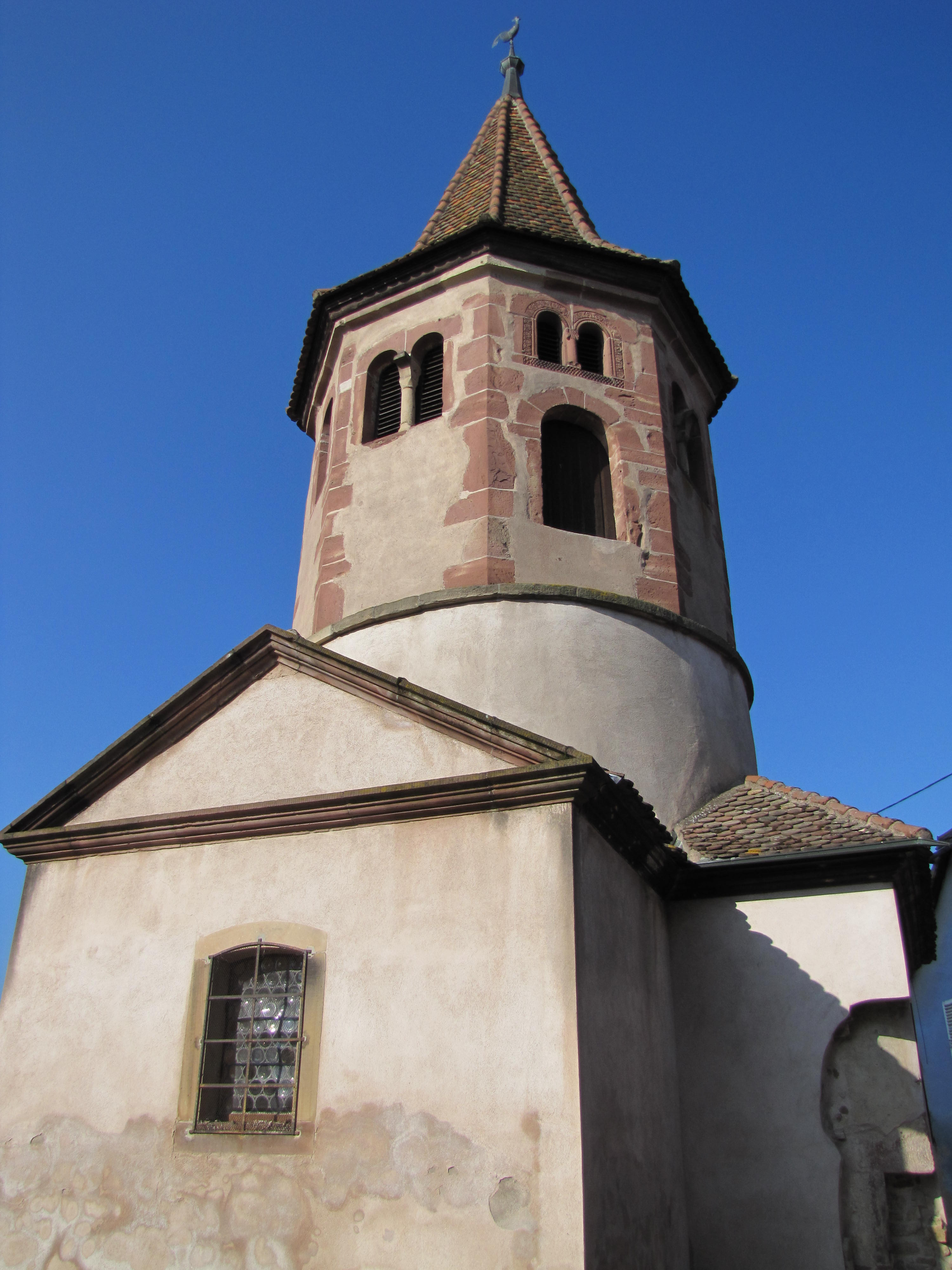 Alsace, Bas-Rhin, Avolsheim, Chapelle Saint-Ulrich dit "le Baptistère" (XIe-XIIe) (PA00084593, IA67006082).